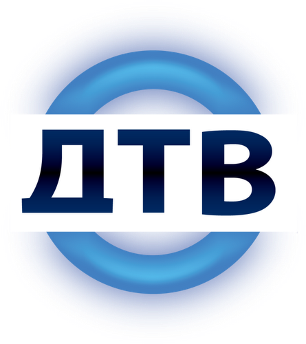 Логотип ДТВ с 11 января 2009 по 29 августа 2010 года